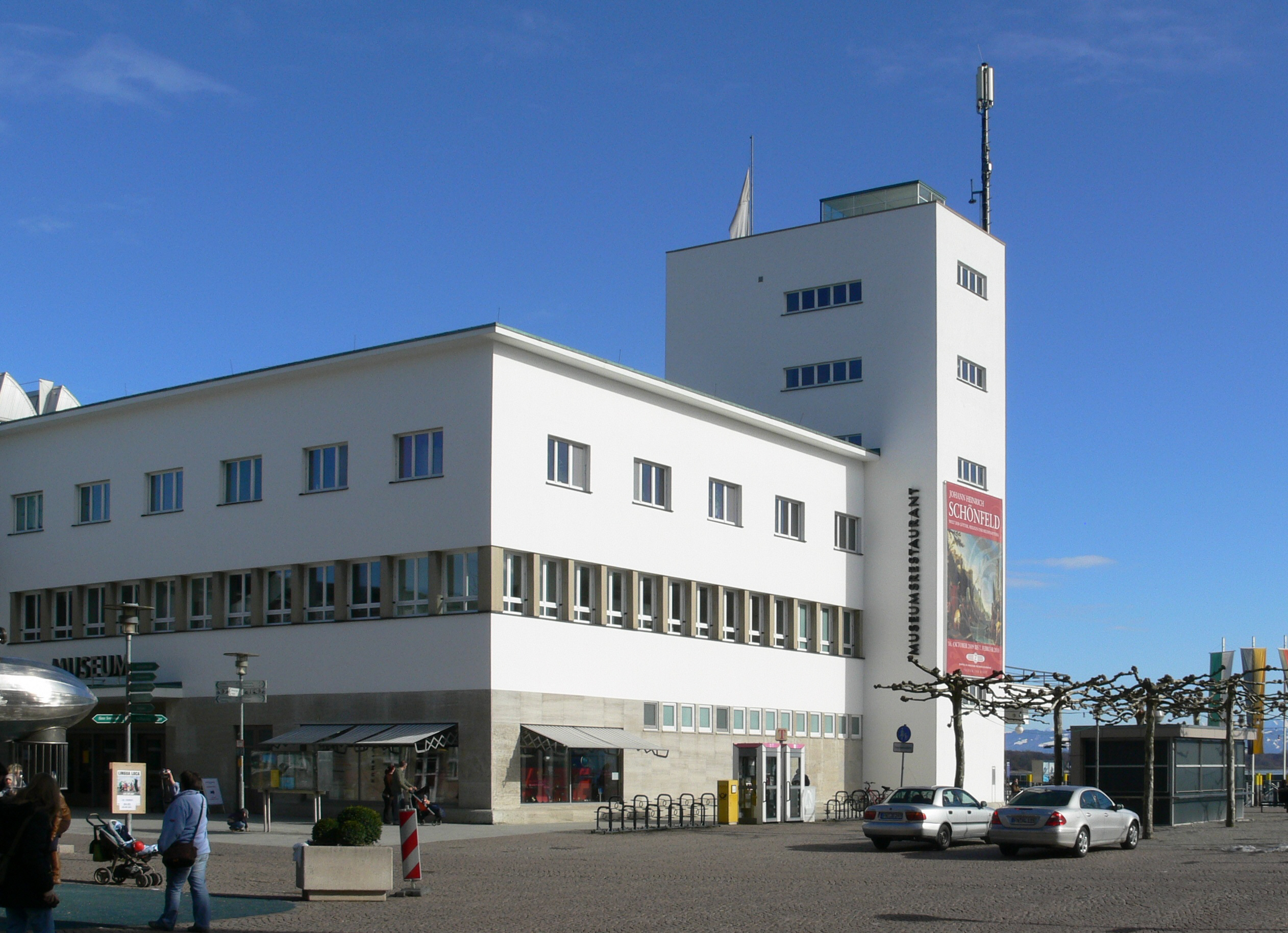 Friedrichshafen Zeppelin-Museum (ehemaliger Hafenbahnhof)